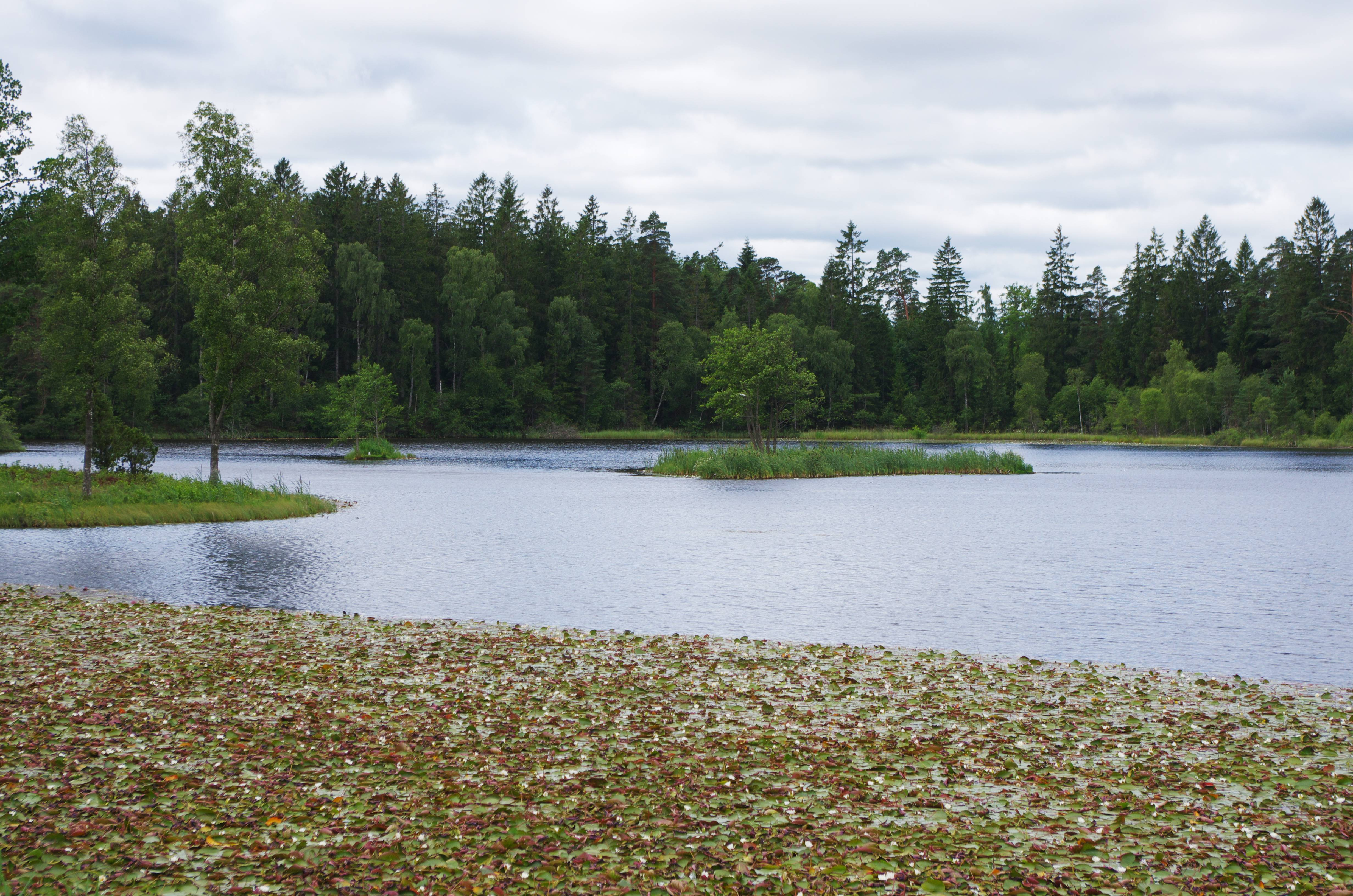 Skärsjön i tätorten Markaryd.